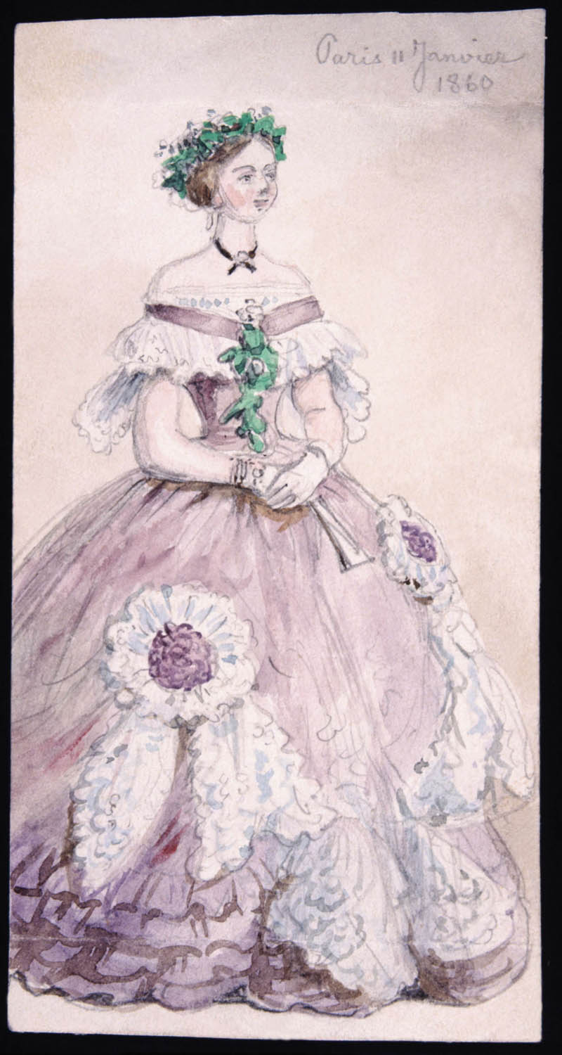 Paris Janvier 1860. Toilette de Mme de Dardel." Akvarell av Fritz von Dardel, 1860